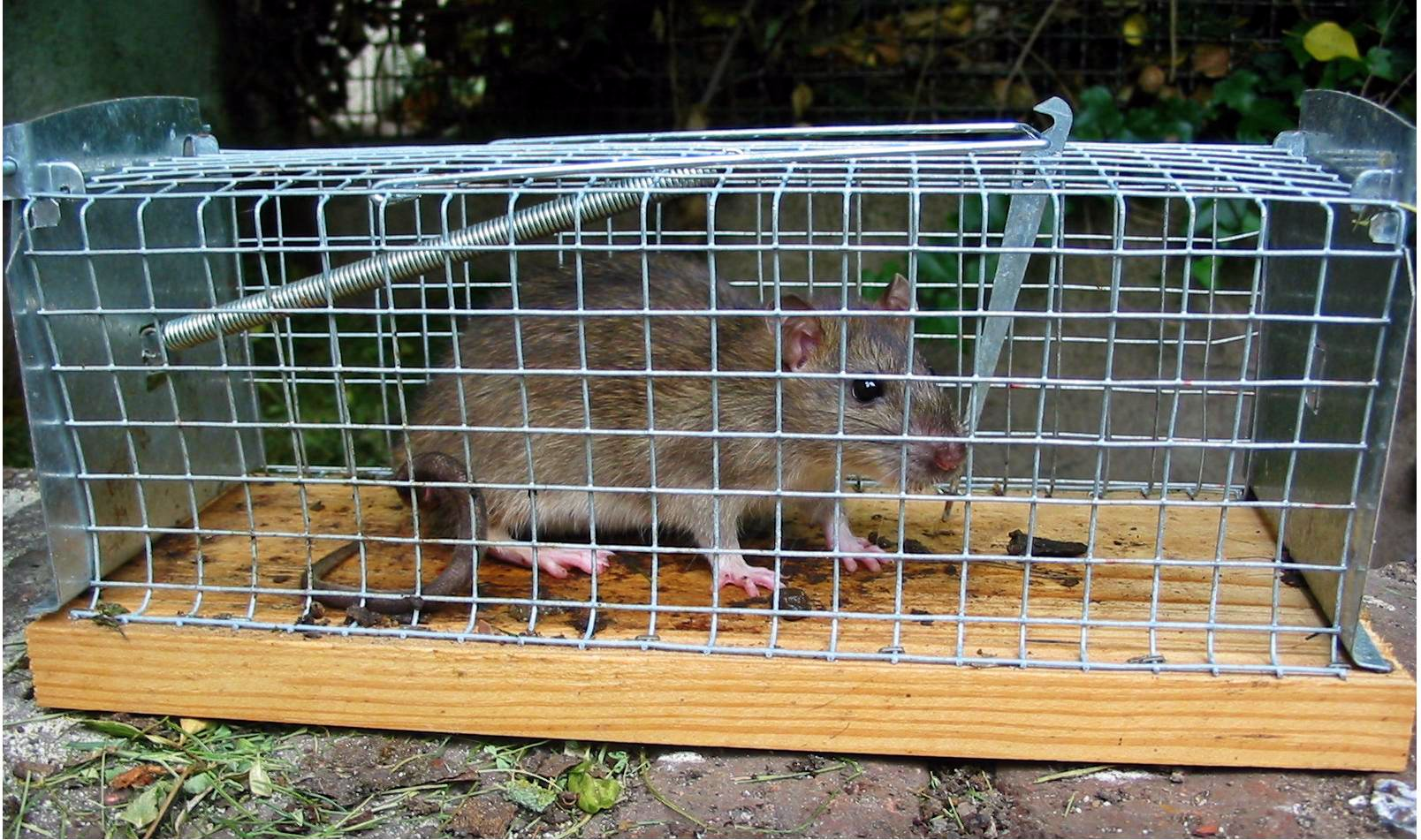 Rattenfalle Lebendfalle, selbst gekauft, selbst gefangen, selbst fotografiert